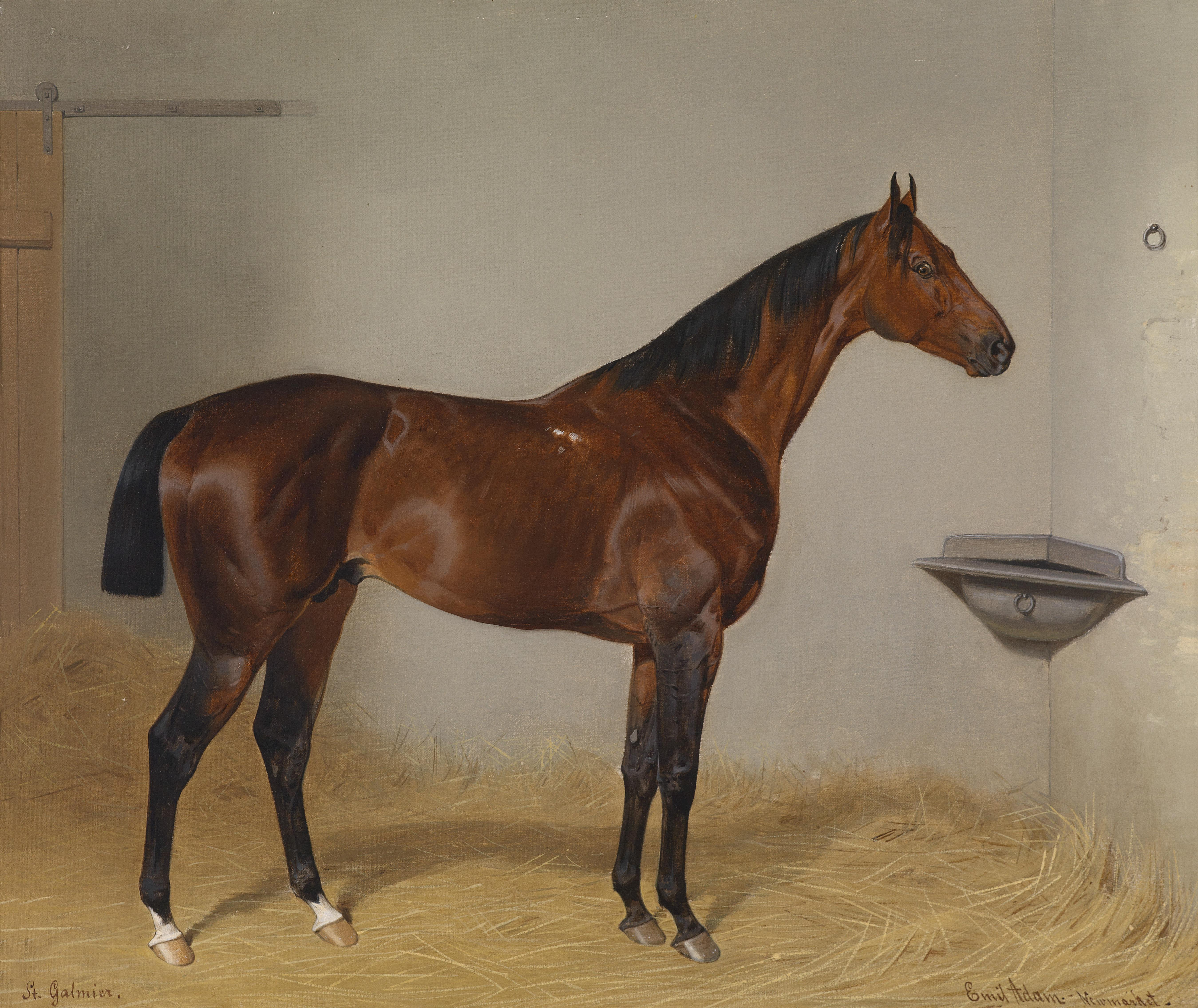 Pferdeportrait "St. Galmier", signiert, bezeichnet Emil Adam Newmarket, Öl auf Leinwand, 55 x 64,5 cm